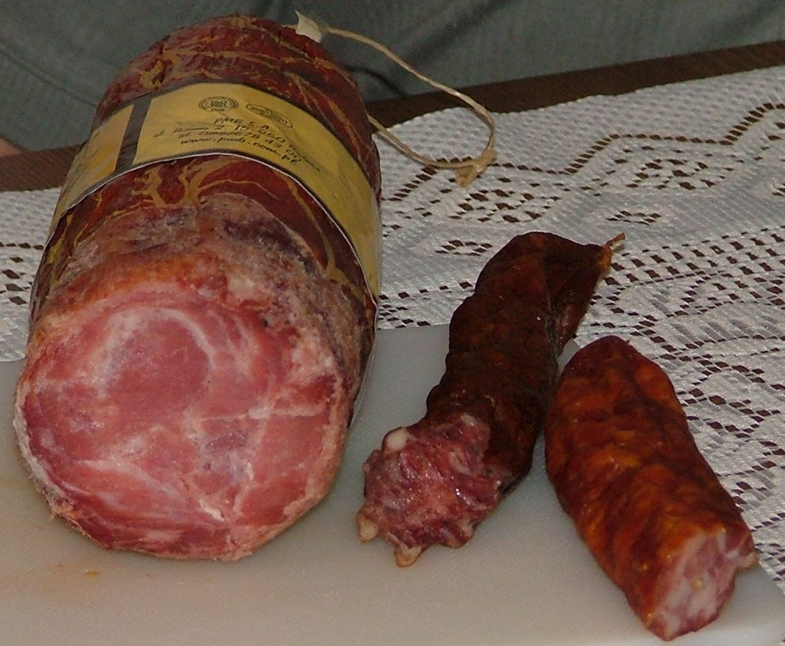 Kindziuk, kindziukas lub skilandis